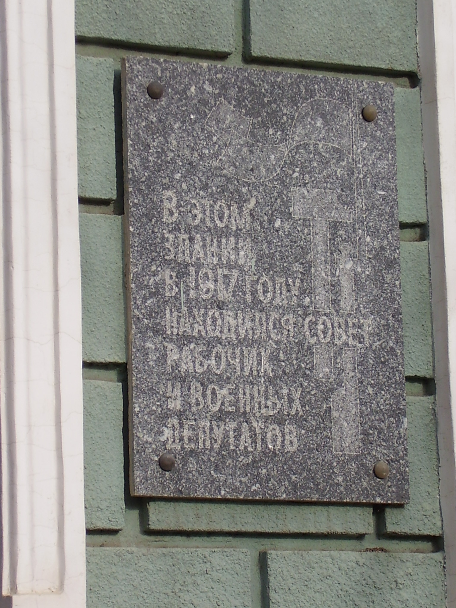 Меморіальна дошка на будинку ради робітничих та військових депутатів, м. Миколаїв Миколаївська весна у Вікіпедії